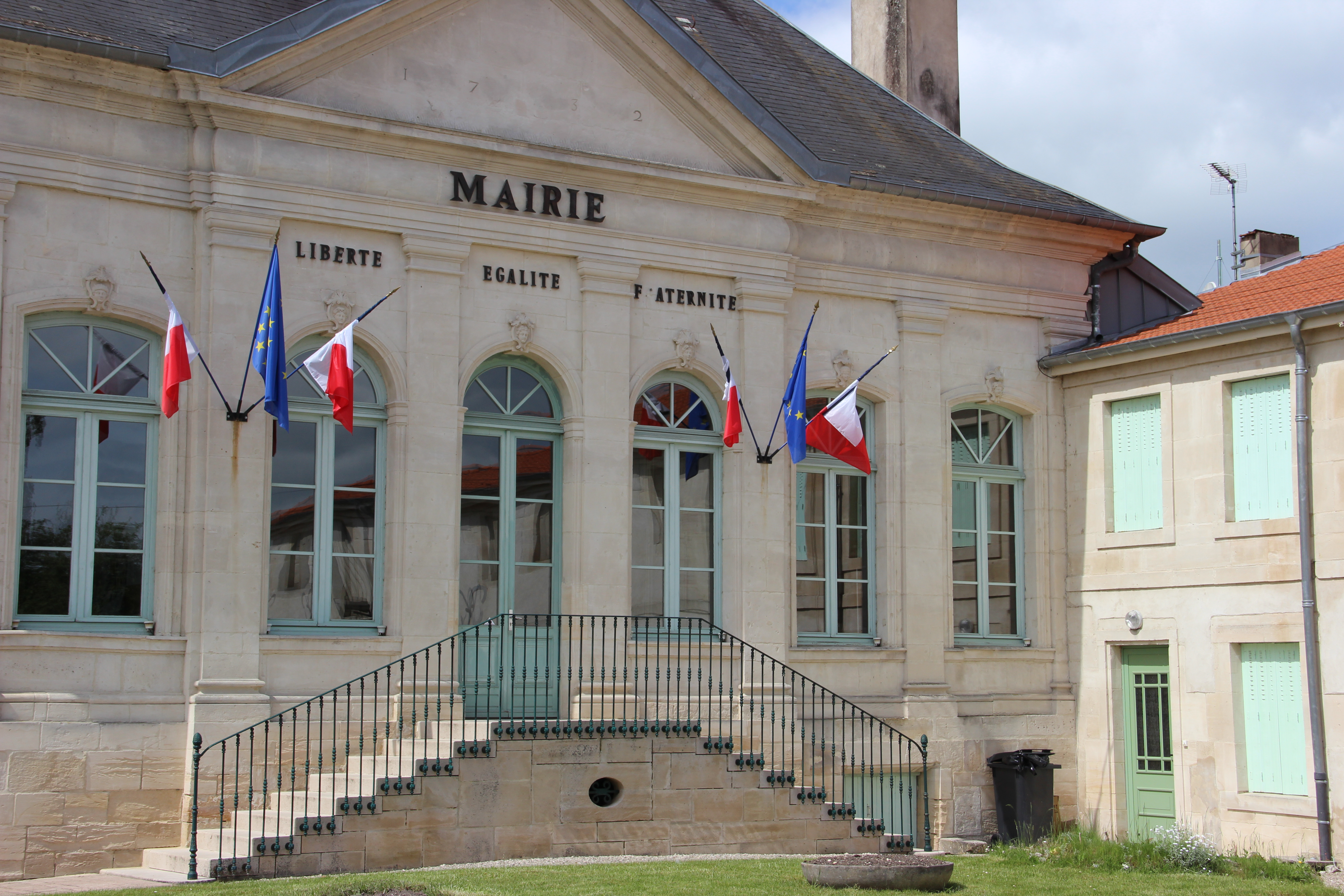 La mairie, ancien Château du Tertre